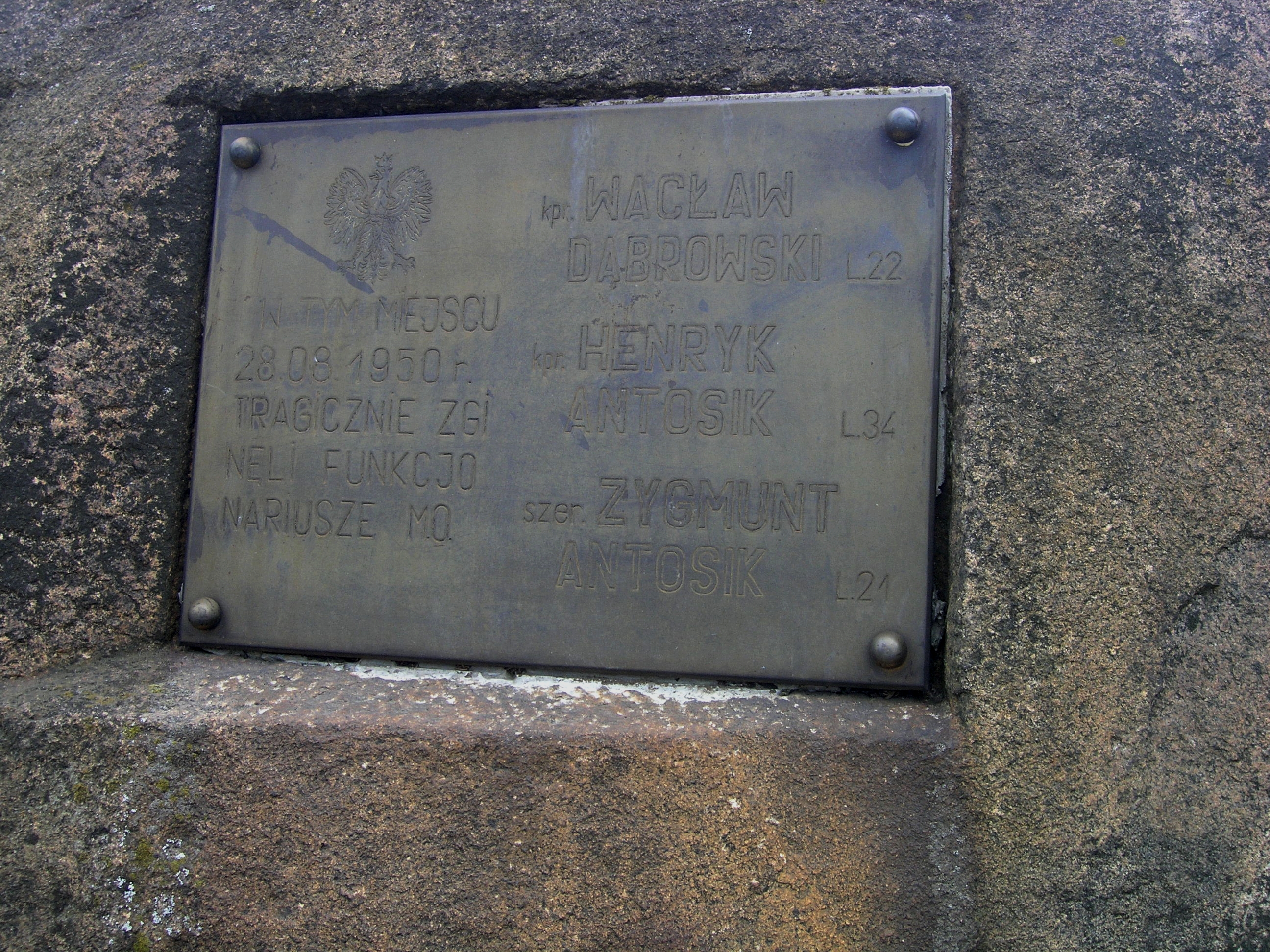 Kamień upamiętniający trzech funkcjonariuszy MO zabitych 28.08.1950 r., przy stacji kolejowej w Pomiechówku przez żołnierzy podziemia antykomunistycznego. Zabici milicjanci to Wacław Dąbrowski (22 lata), Henryk Antosik (34 lat) oraz Zygmunt Antosik (21 lat). Z dostępnych relacji wynika, że do zdarzenia doszło gdy czterech partyzantów pod dowództwem st. sierż. Mieczysława Dziemieszkiewicza ps.„Rój” z oddziału XVI Okręgu Narodowego Zjednoczenia Wojskowego rozbroiło posterunek Służby Ochrony Kolei i zastrzeliło dwóch funkcjonariuszy tej formacji. Następnie partyzanci zatrzymali pociąg i przeprowadzili kontrolę pasażerów. Zlikwidowano wtedy dwóch milicjantów z Modlina – Henryka Antosiaka i Wacława Dąbrowskiego oraz zabrano ich broń. Rozbrojono również dwóch oficerów WP.